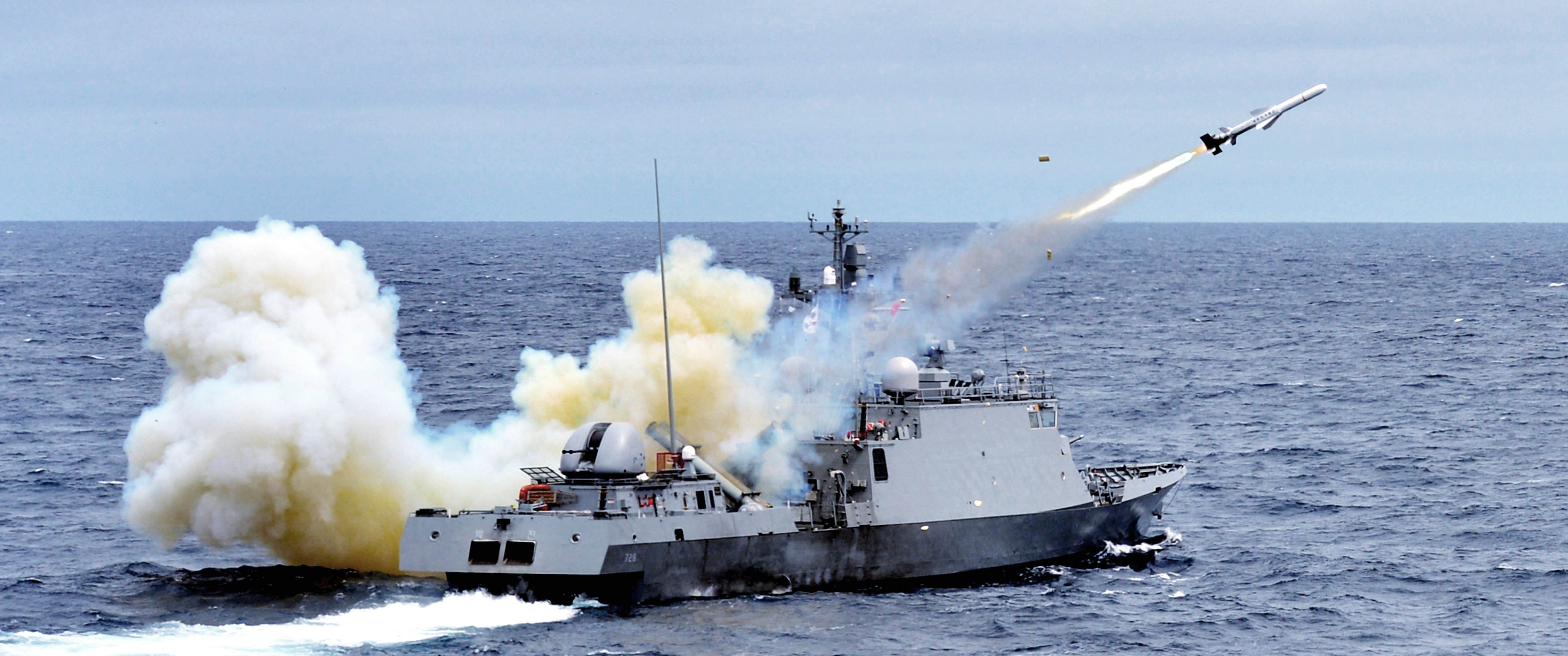 해군 1함대 초계함 원주함이 전투단 실사격 훈련에서 가상의 적 잠수함을 향해 국산 경어뢰 '청상어'를 발사하고 있다. 촬영 - 박흥배 기자